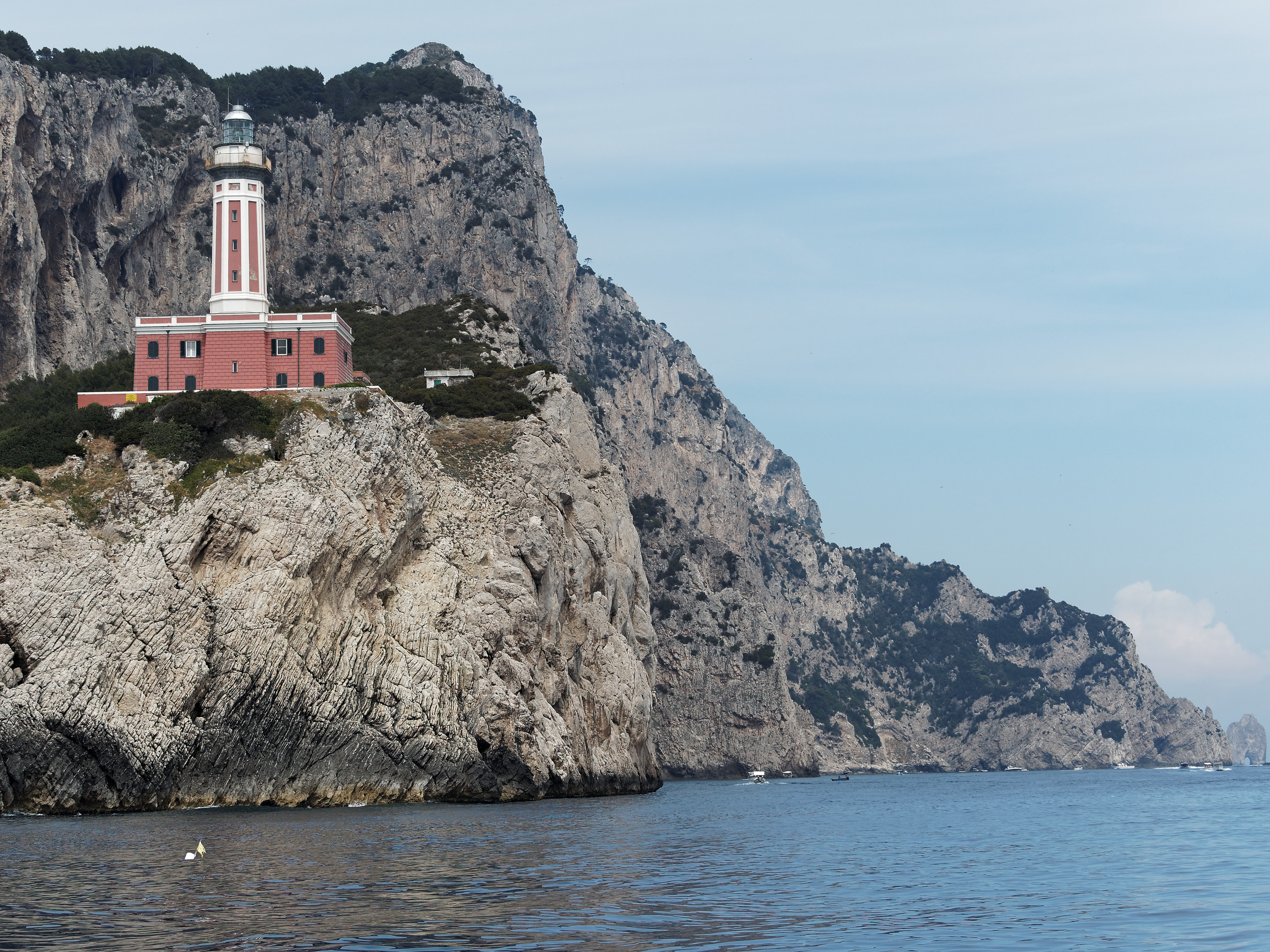 Das Leuchtfeuer Faro Punta Carena auf der Südwestseite der Insel Capri, aus nordwestlicher Richtung, Kampanien, Italien.